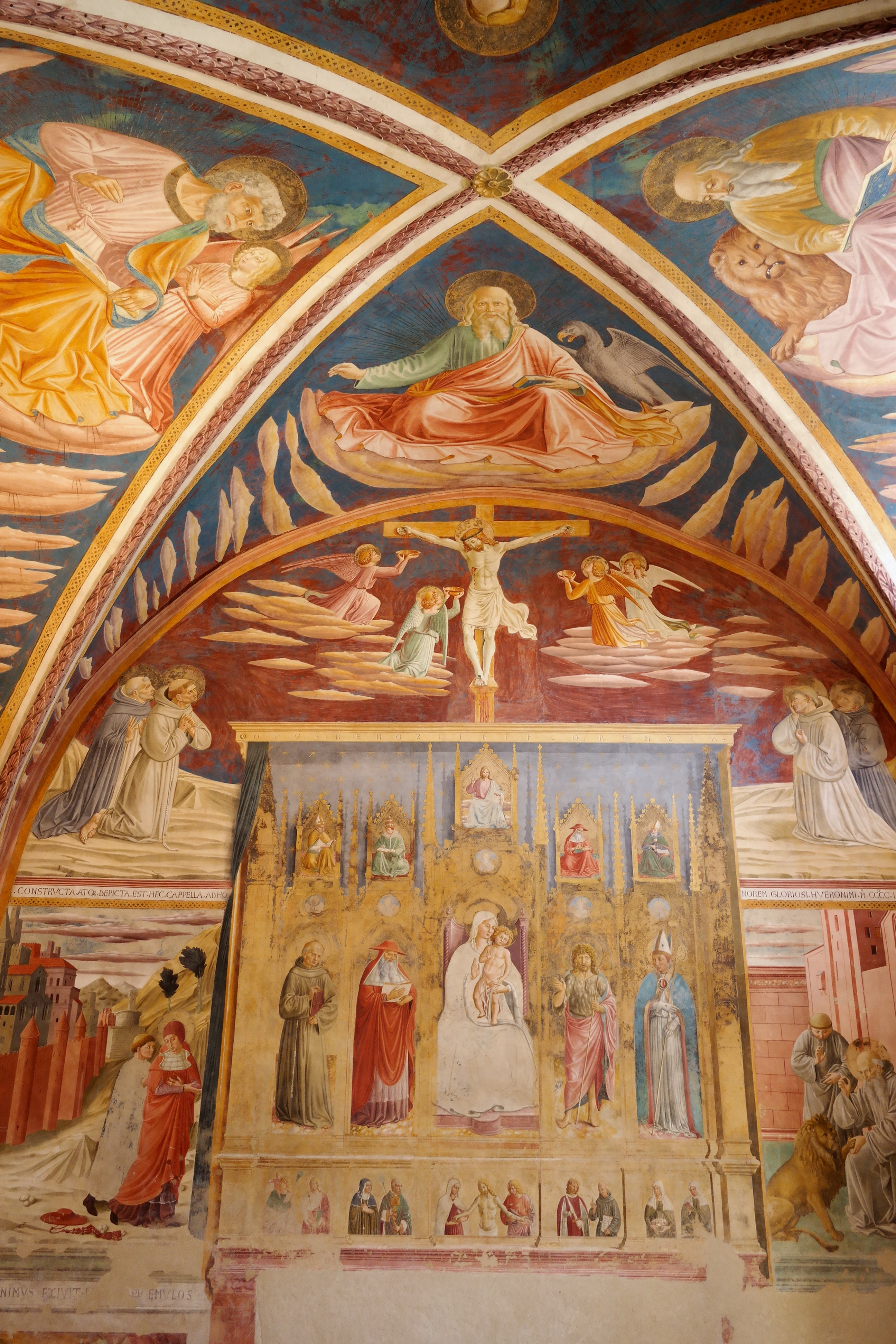 Cappella di San Gerolamo, affrescata da Benozzo Gozzoli, all'interno della Chiesa di San Francesco a Montefalco